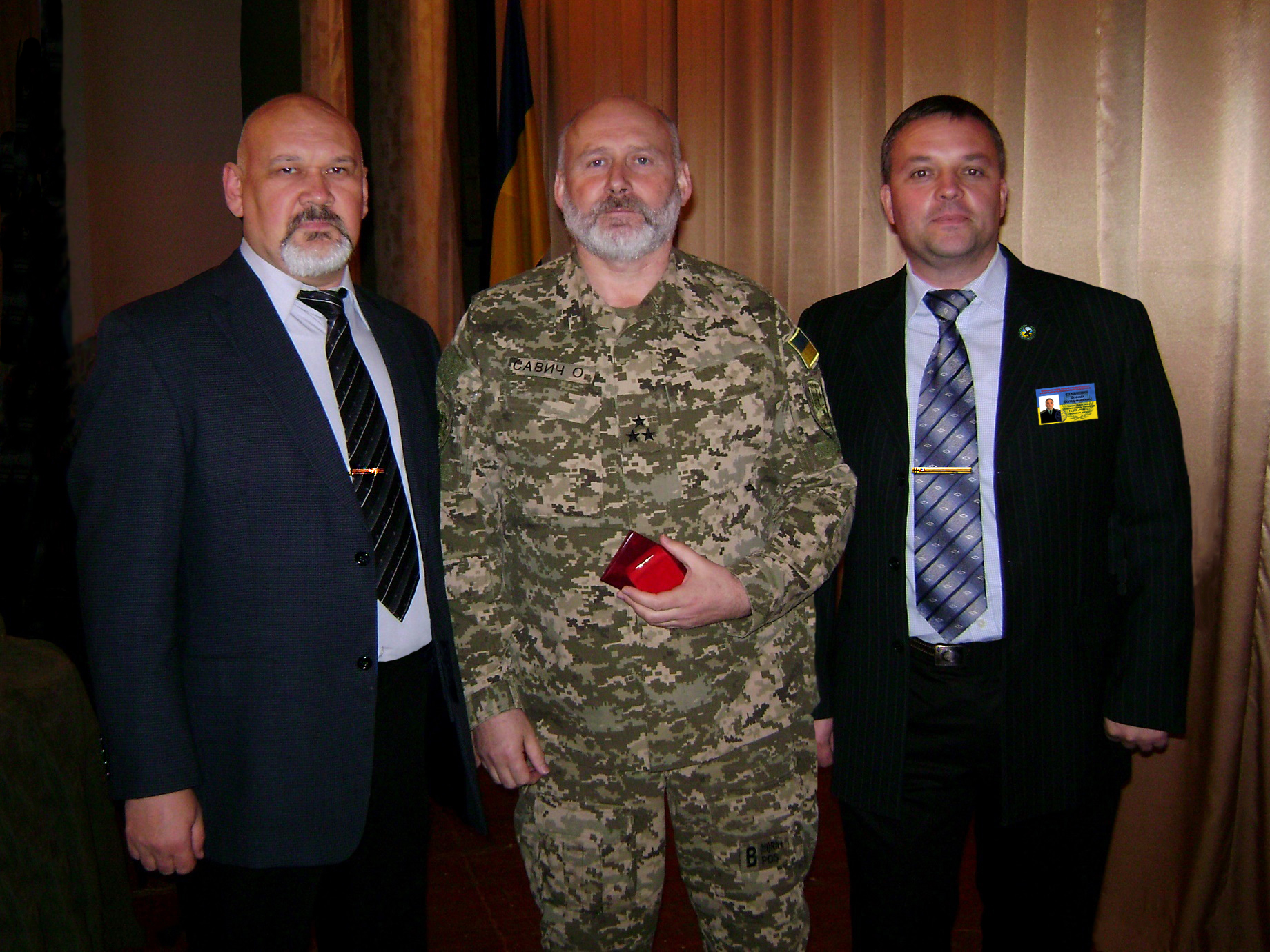 28-29 жовтня 2015 року в Пущі-водиці відбувся Всеукраїнський збір представників громадських об’єднань, ветеранів та учасників АТО